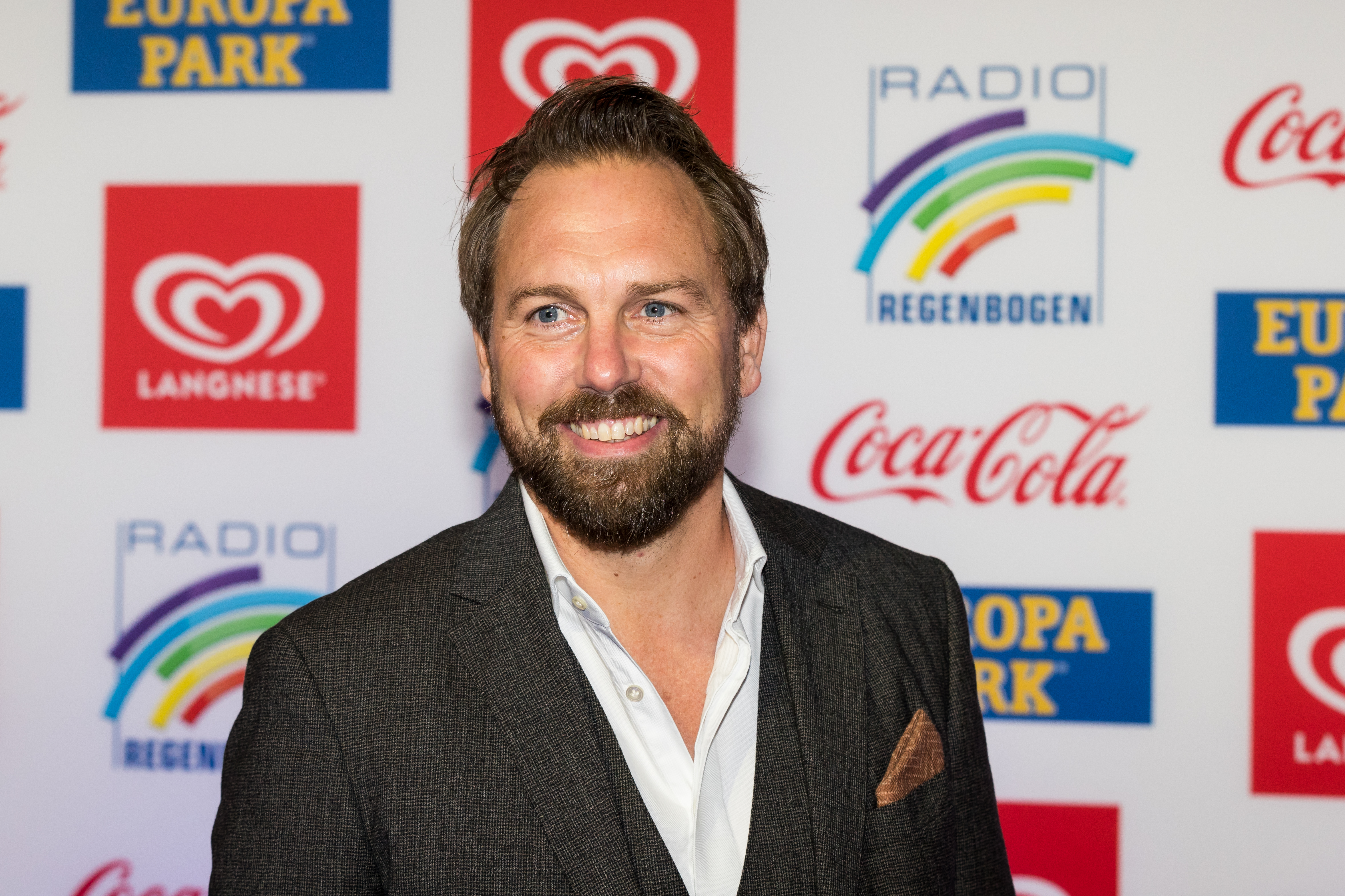 during Radio Regenbogen Award 2018 at Europapark, Rust, Baden-Württemberg, Germany on 2018-03-23, Photo: Sven Mandel